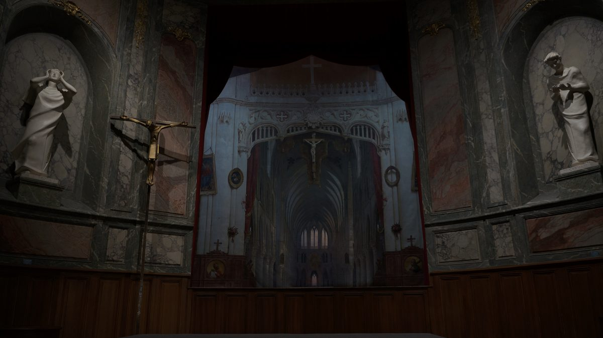 Het diorama dat Daguerre in 1842 aan de kerk van Bry-sur-Marne, nabij Parijs, schonk. Het monumentale schilderij werd in 2013 gerestaureerd. Een lichtsequentie - die verschillende delen van het half-transparante doek belicht - zorgt ervoor dat het schilderij de illusie van diepte krijgt: alsof het interieur verandert van een dag- in een nachtscène.